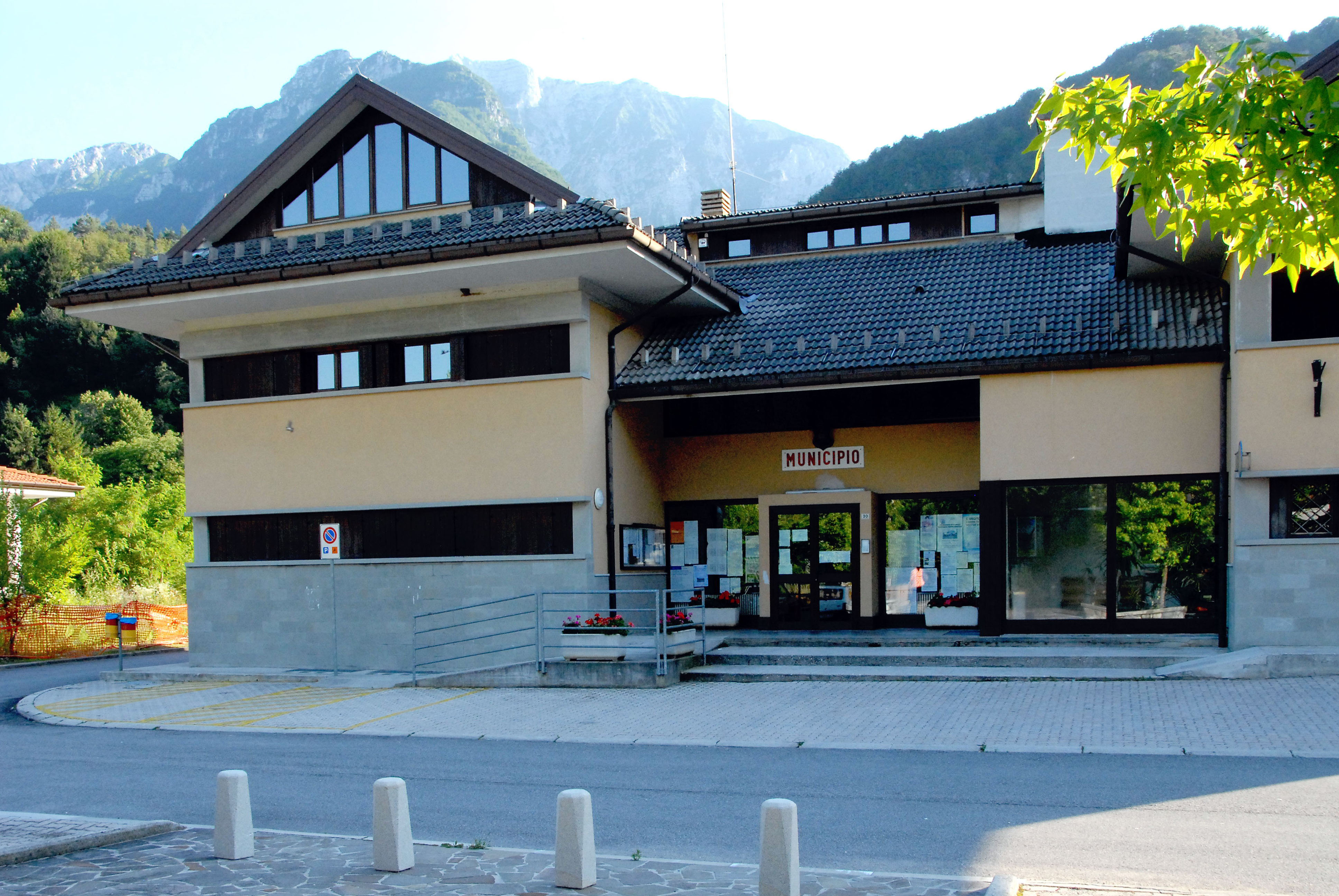 Municipio at Resiutta in the Fella valley in the province of Udine, Friuli-Venezia Giulia, Italy